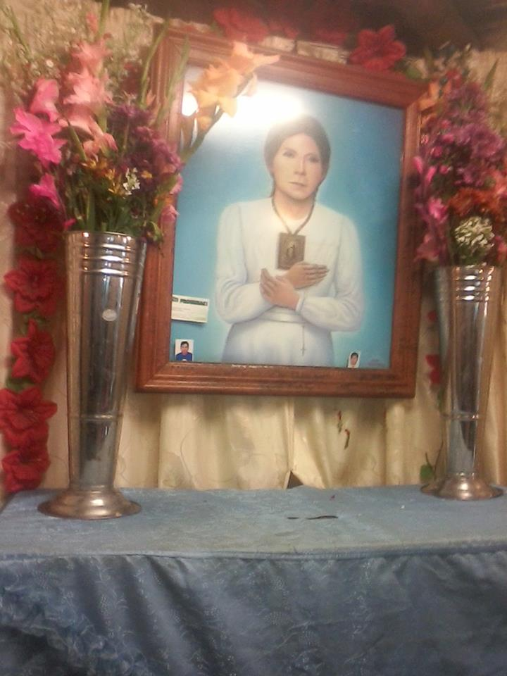 melchorita es una "sierva de dios"